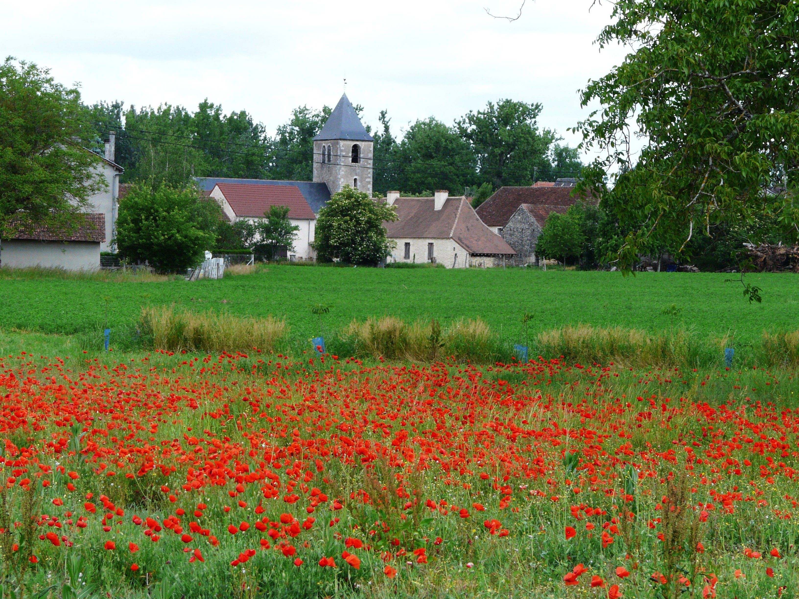 Vu depuis le sud-sud-ouest, le village de Sainte-Eulalie-d'Ans, Dordogne, France.